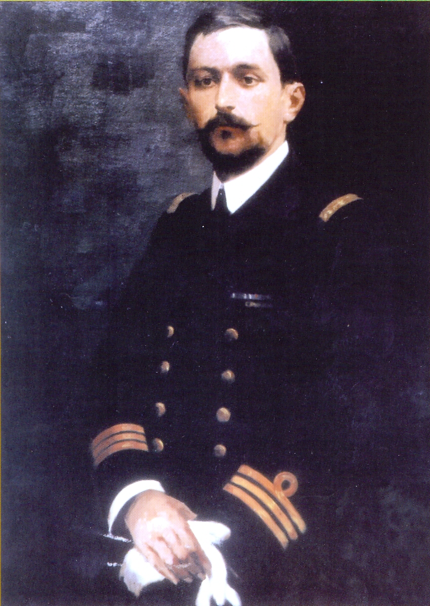 O αξιωματικός του Πολεμικού Ναυτικού και πρωτοπόρος της ελληνικής αεροπορίας Αριστείδης Μωραϊτίνης (1906-1918)